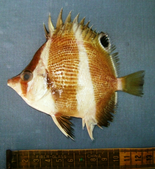 Roa jayakari, Karachi 2013, Pakistán